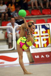 Raquel Rodriguez realizando un ejercicio de pelota (2003).